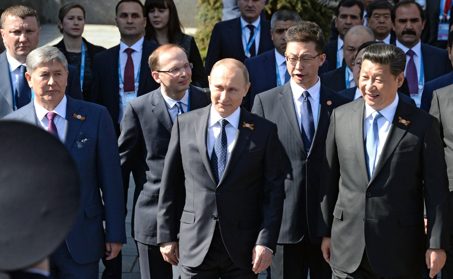 Перед началом военного парада в ознаменование 70-й годовщины Победы в Великой Отечественной войне 1941–1945 годов.